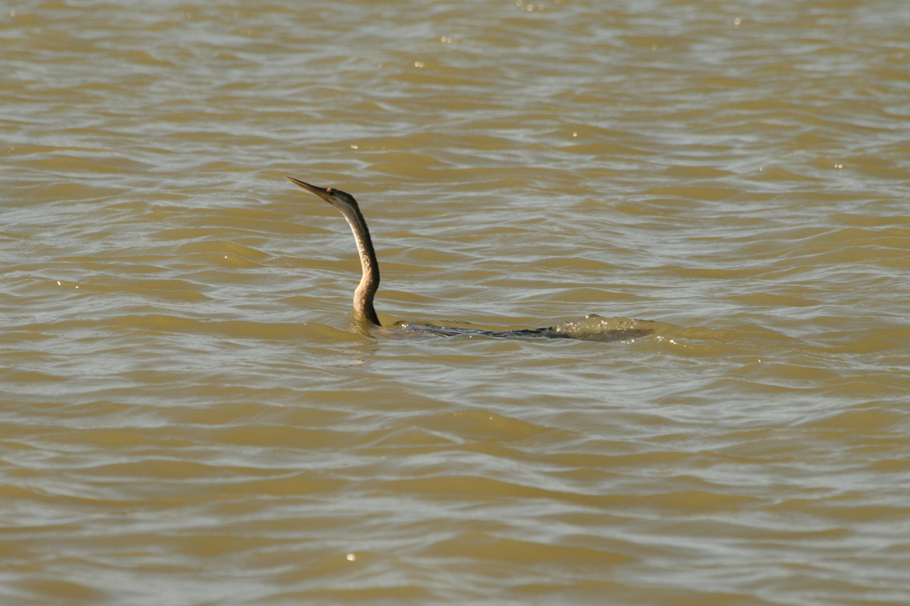 Cormoran dans la reserve de Djoudj